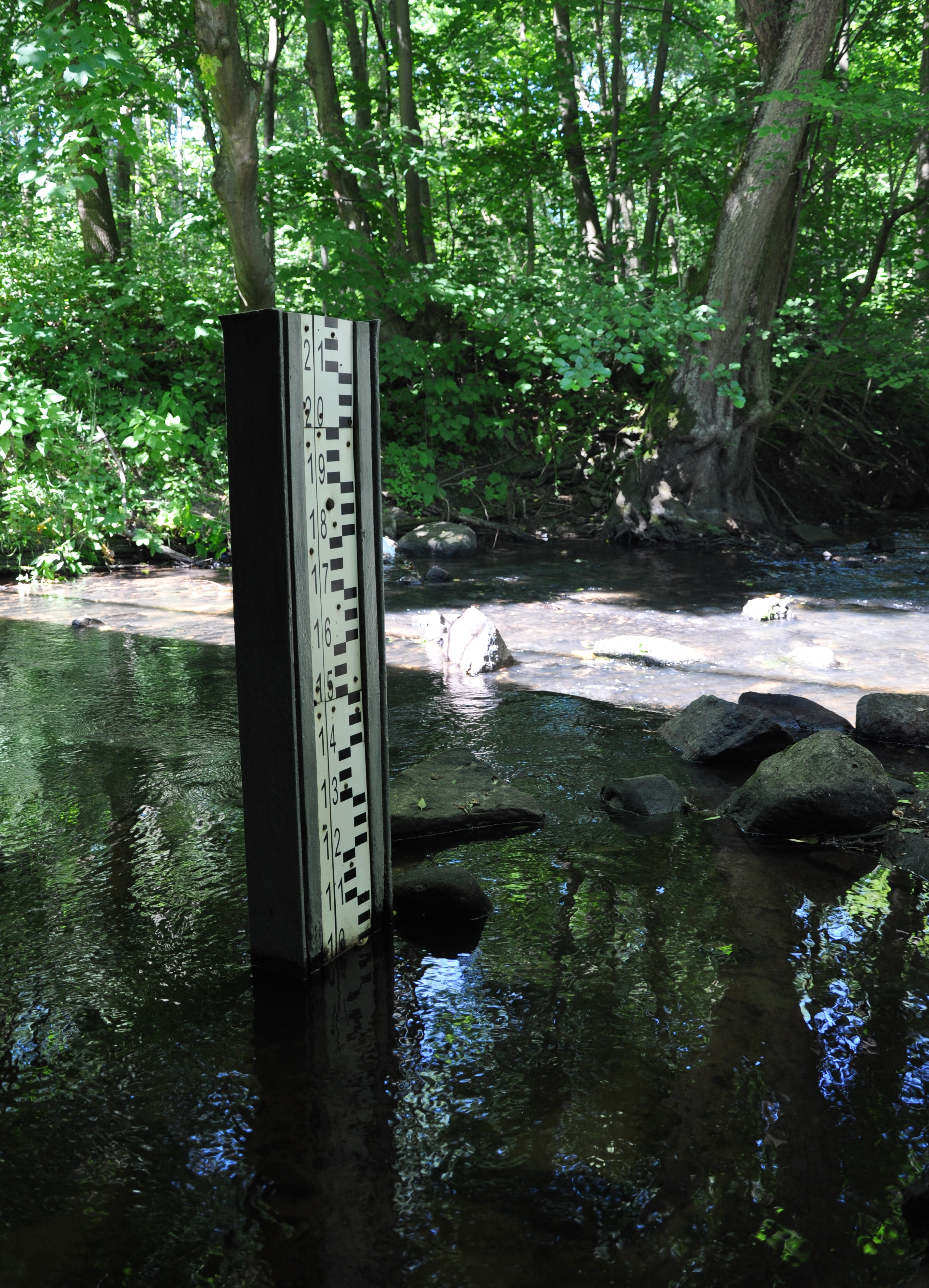 Wodowskaz pod drogą na rzece Sąpólna, pod Sąpolem